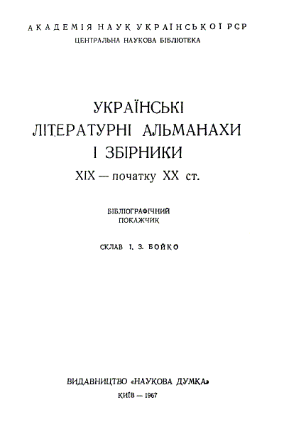 Українські літературні альманахи і збірники XIX — початку XX століття